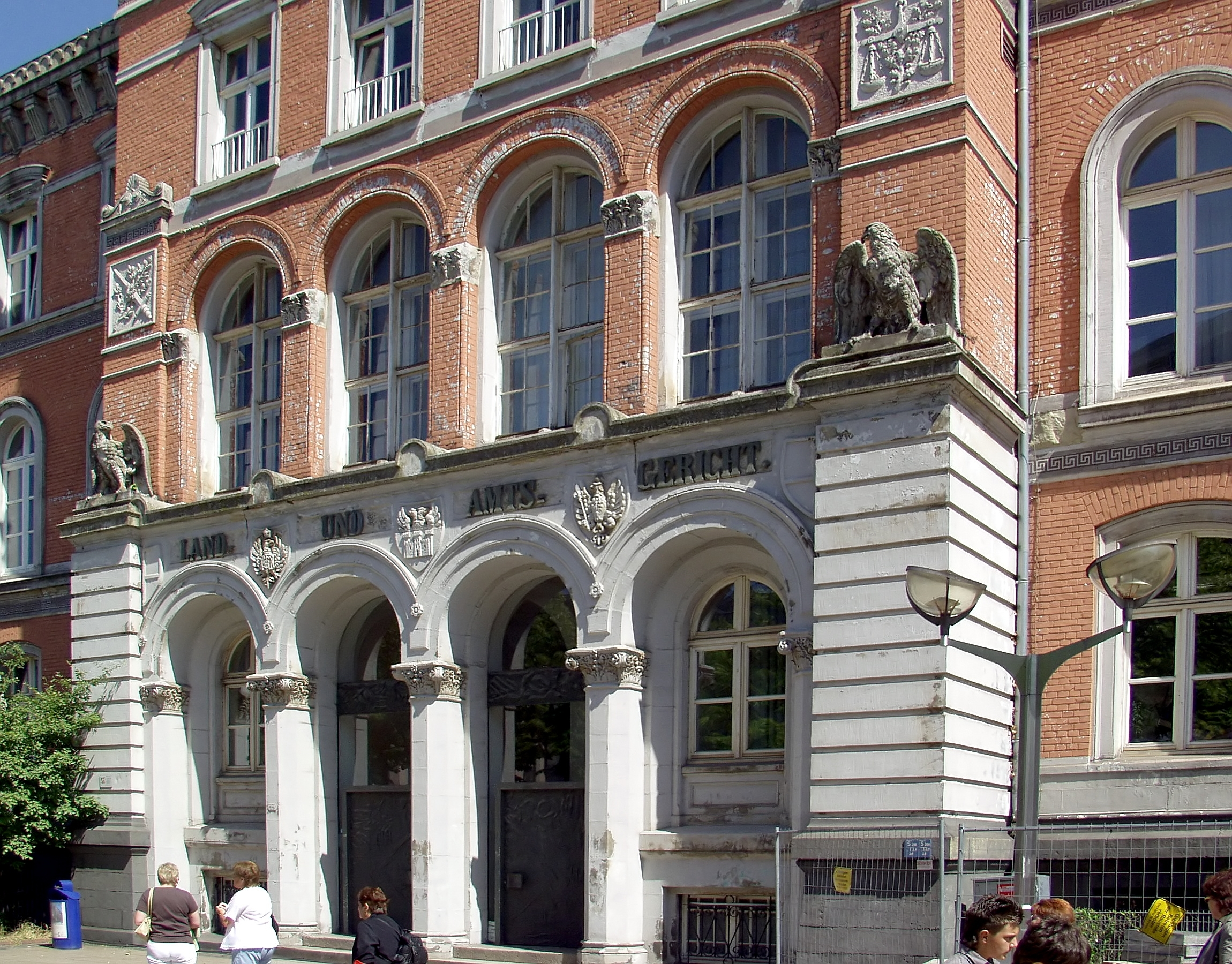 Land- und Amtsgericht Duisburg, Portal Königstraße